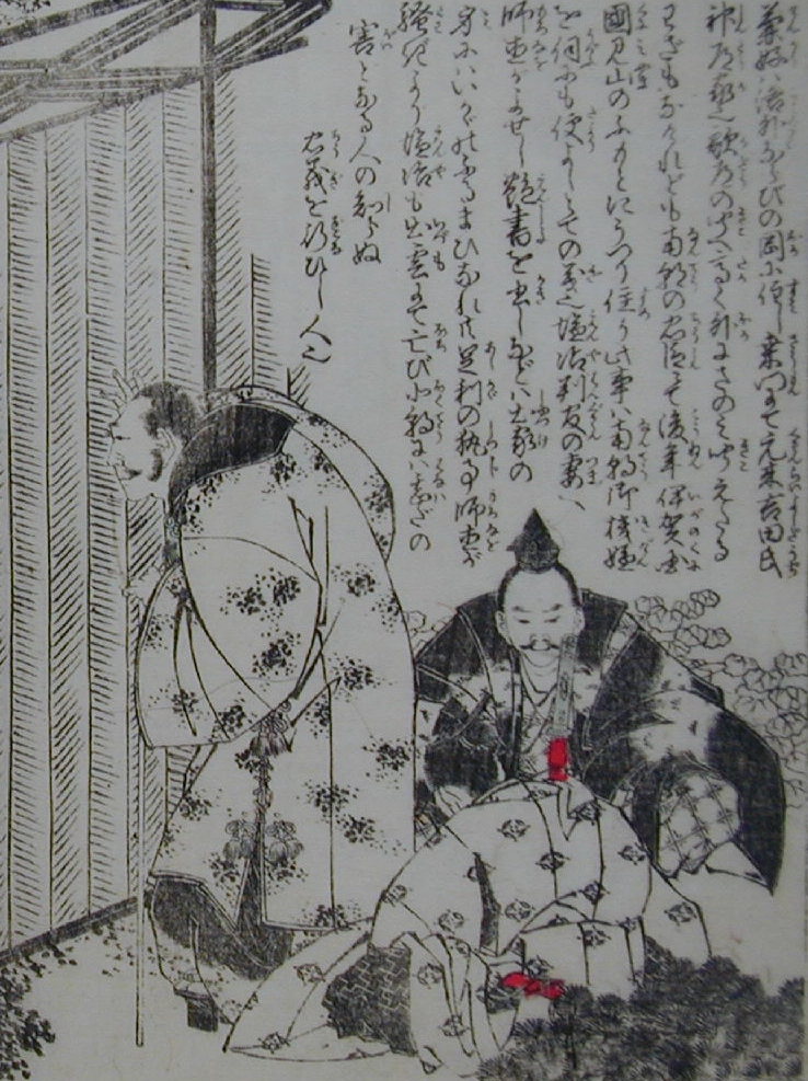 kou_moronao